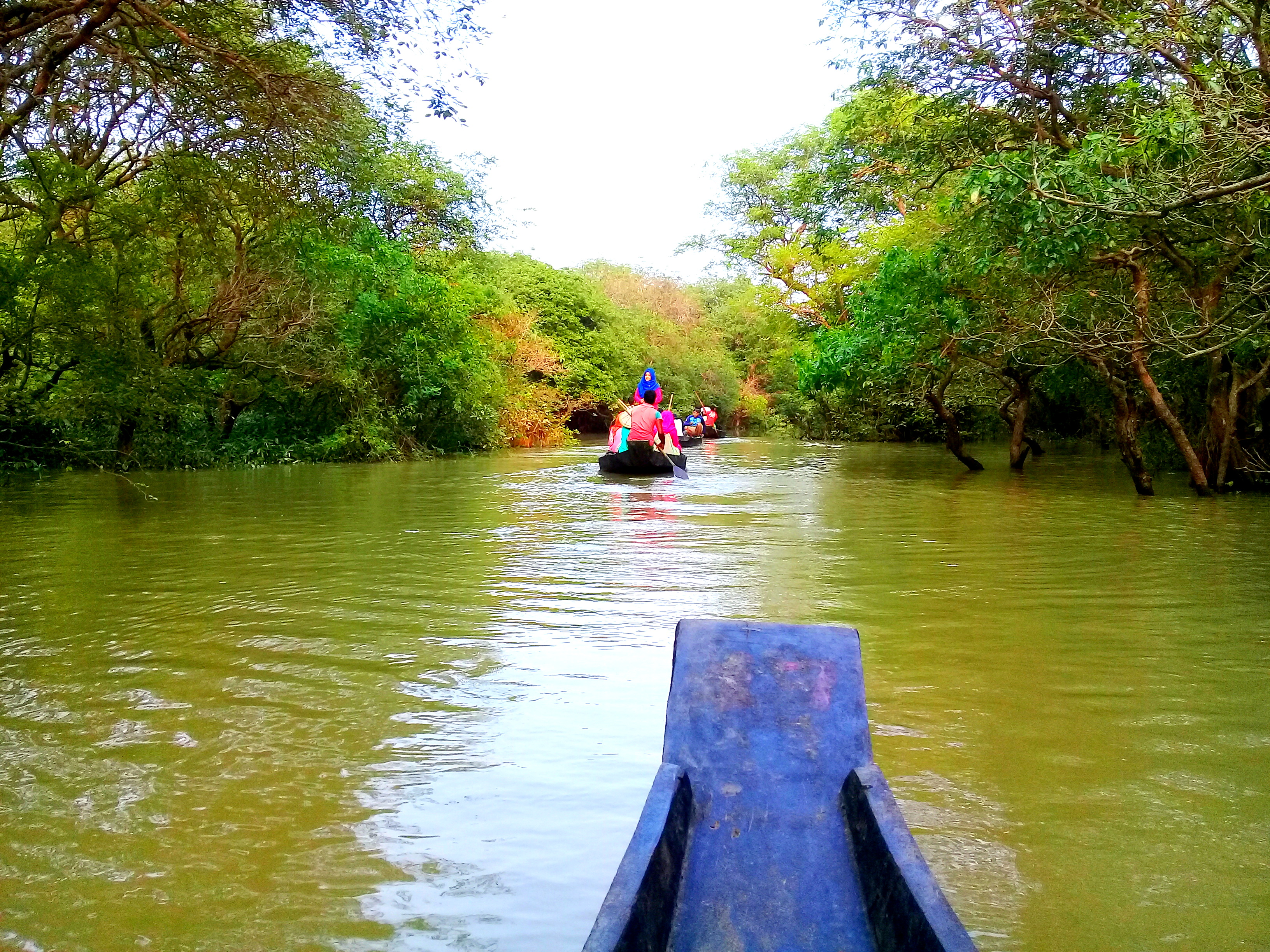 রাতারগুল জলাবন